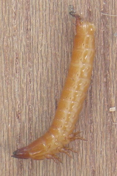 zelfgemaakte foto van ritnaald; begin oktober